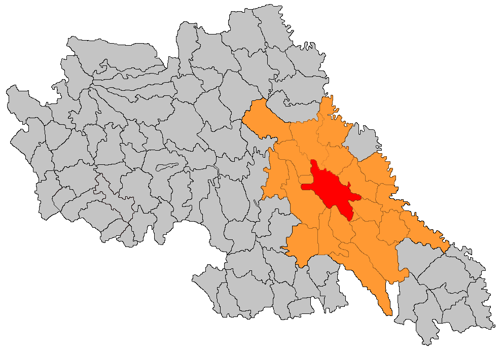 creată pe baza unei hărţi blank a judeţului iaşi deja existentă Licensing Categorie:Hărţi ale judeţului Iaşi